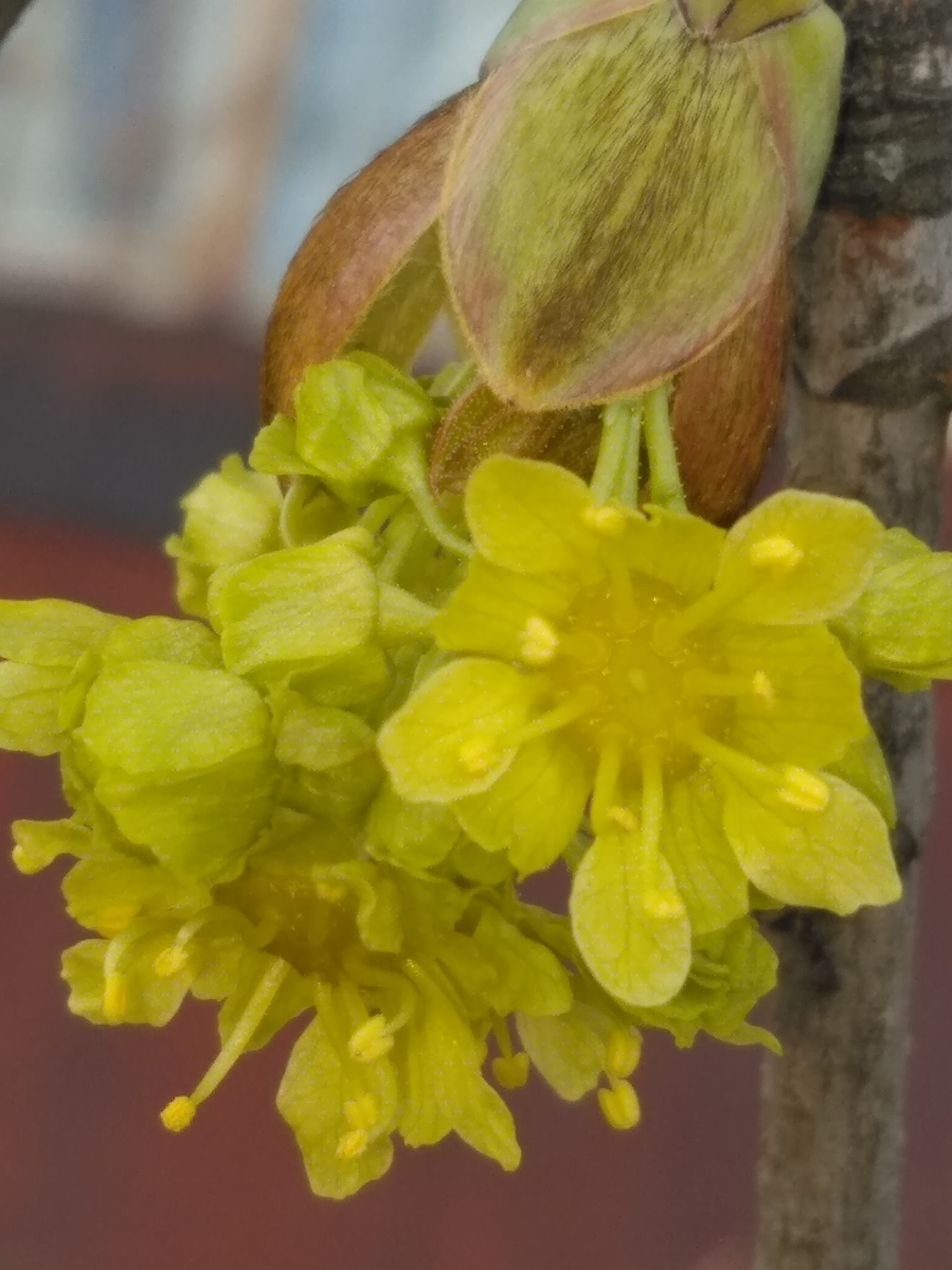 Клен звичайний або гостролистий (Acer platanoides), суцвіття клену